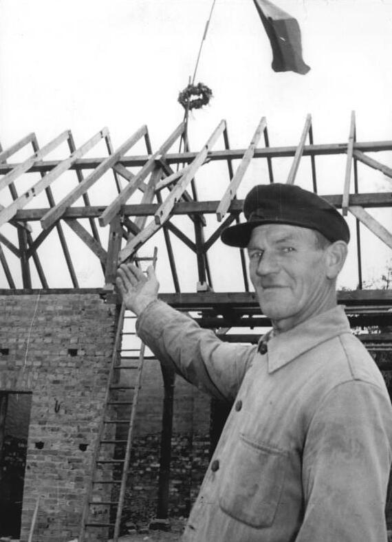 Eichow, Einzelbauer vor einem Scheunenrohbau ZB-Schutt-18.10.1954 Volkswahlen am 17. Oktober 1954. Der werktätige Bauer Otto Kinzer aus Eichow Kreis Cottbus weist stolz auf seine neuerbaute Scheune. Die alte Scheune fiel am 5. September 1954 einem Blitzeinschlag zum Opfer und brannte vollständig nieder. Mit Hilfe und Unterstützung der Regierung war es möglich, dass bereits am 16. Oktober das Richtfest der neuerbauten Scheune gefeiert werden konnte. Als Dank an die Regierung war der Bauer Otto Kinzer am 17. Oktober mit einer der ersten im Wahllokal und gab offen seine Stimme für die Kandidaten der Nationalen Front. "Eine Regierung, die uns Bauern so gut unterstützt, geniesst unser vollstes Vertrauen, deshalb habe ich auch offen meine Meinung kundgetan und die Kandidaten der Nationalen Front gewählt"", erklärte er.